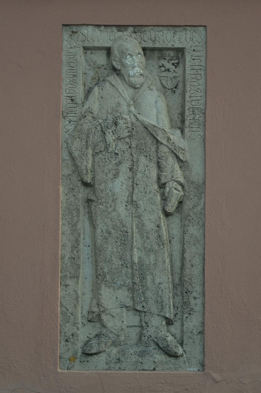 Stephan-Denkmal in der Hofer Stephan-Straße, Ecke Ernst-Reuter-Straße